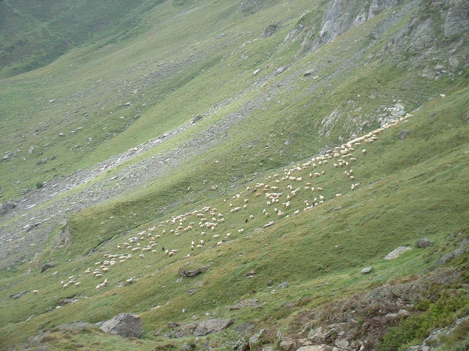 Troupeau de moutons dans une estive des Pyrénées